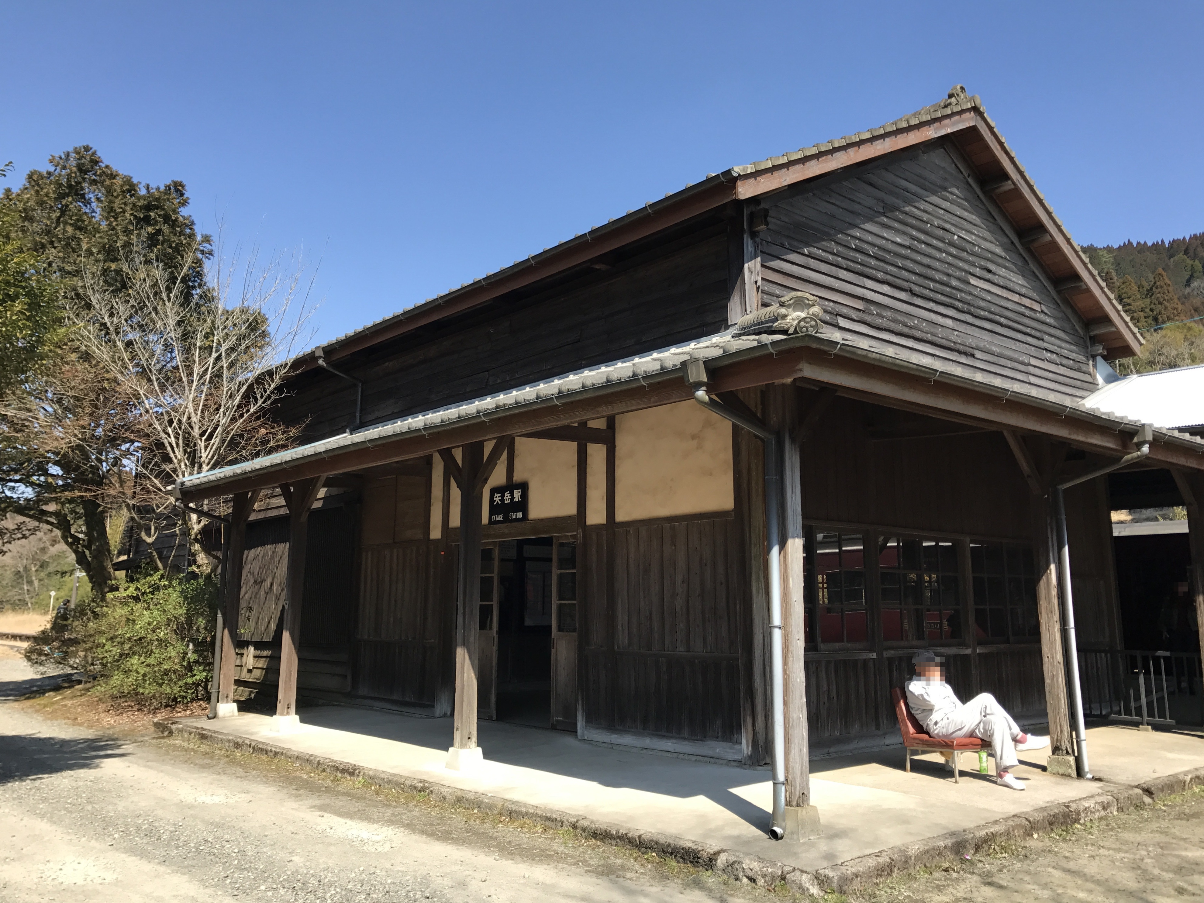 矢岳駅駅舎